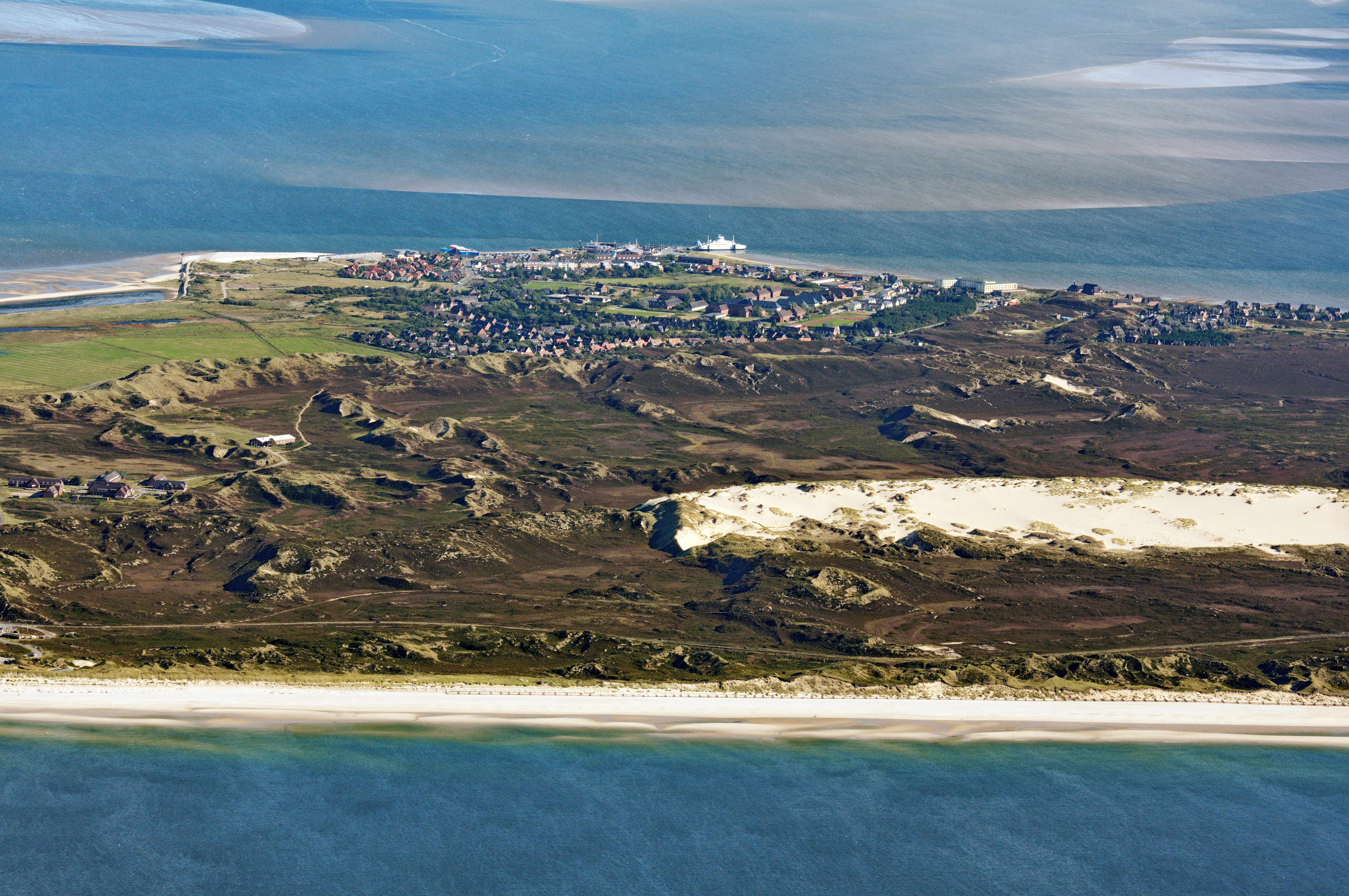 Fotoflug über das nordfriesische Wattenmeer - List auf Sylt (von W)